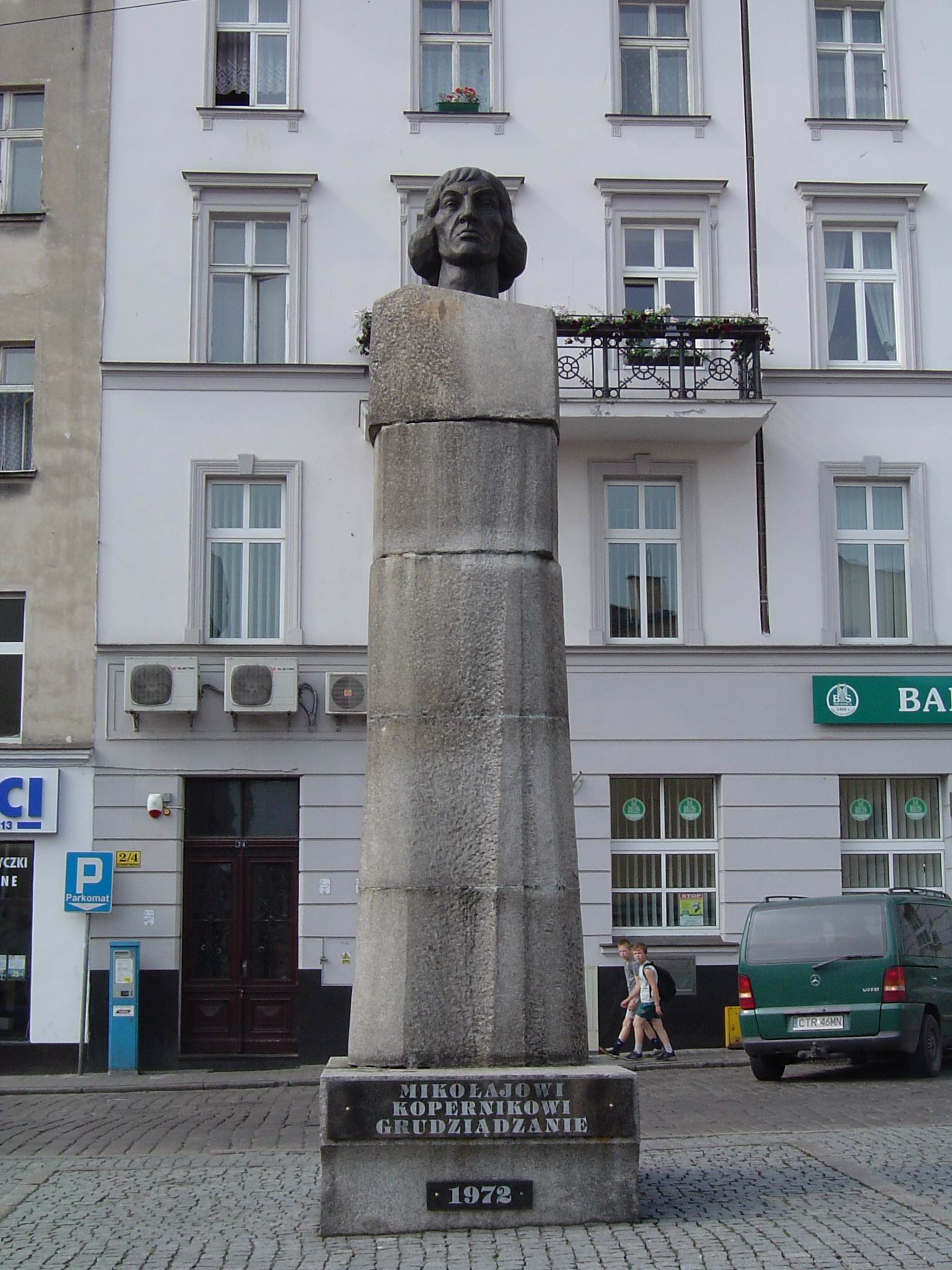 Pomnik Mikołaja Kopernika w Grudziądzu/ Monument of Nicolaus Copernicus in Grudziądz